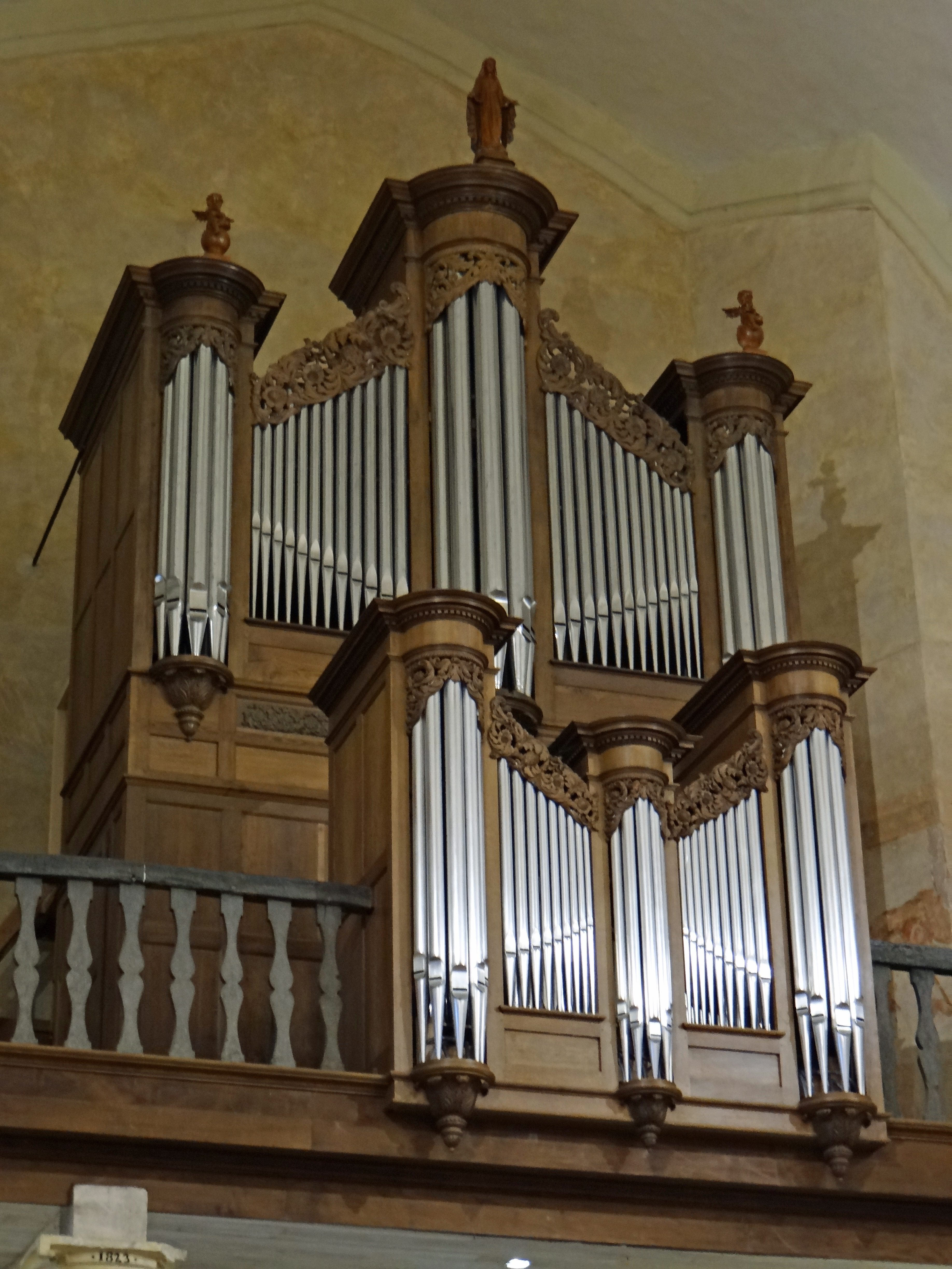 Belvès - Église Notre-Dame-de-l'Assomption - Orgue de Charles Gadault de Paris en 1854, reconstruit avec adjonction d'un positif dorsal par Bertrand Cattiaux en 2015.